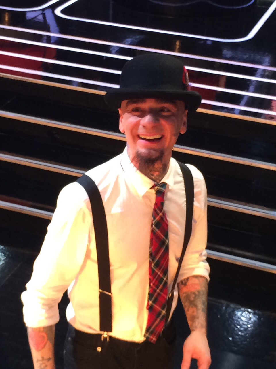 Il cantante italiano J-Ax durante una puntata del talent show The Voice of Italy" nel marzo 2015.